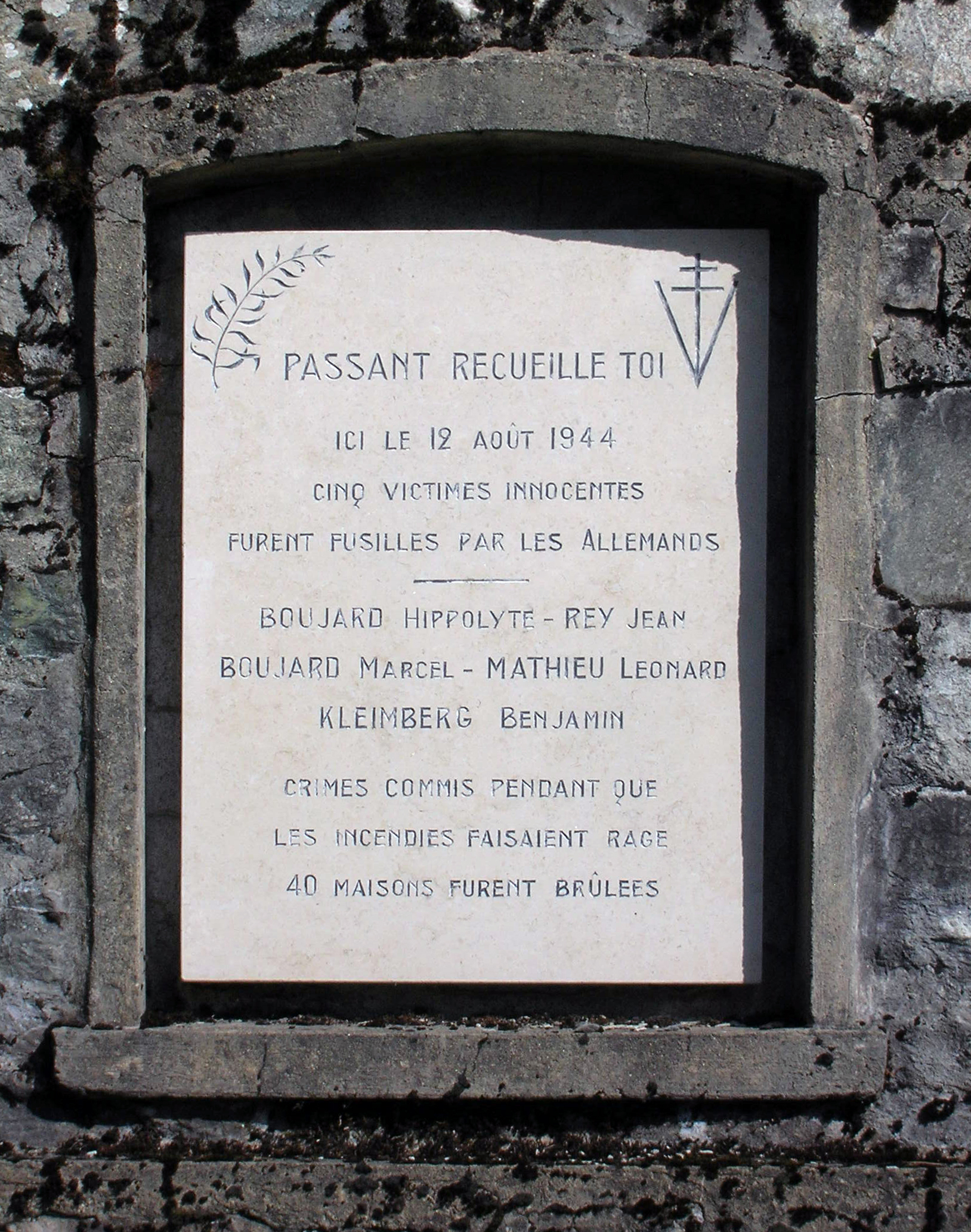 Stèle commémorative sur la route entre Lac Luitel et Séchilienne au lieu-dit Les Clots (Siaray ou Les Combes), Séchilienne, Isère, France.